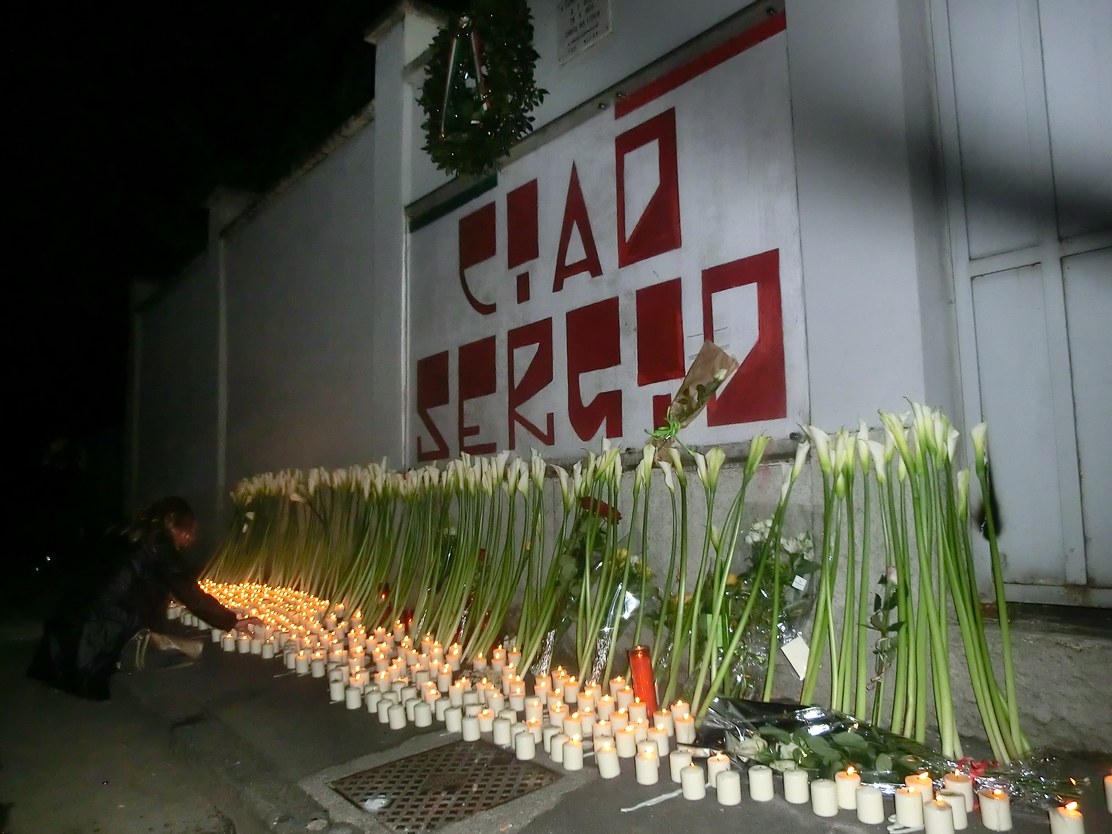 Murales dedicato a Ramelli realizzato sul luogo dell'aggressione